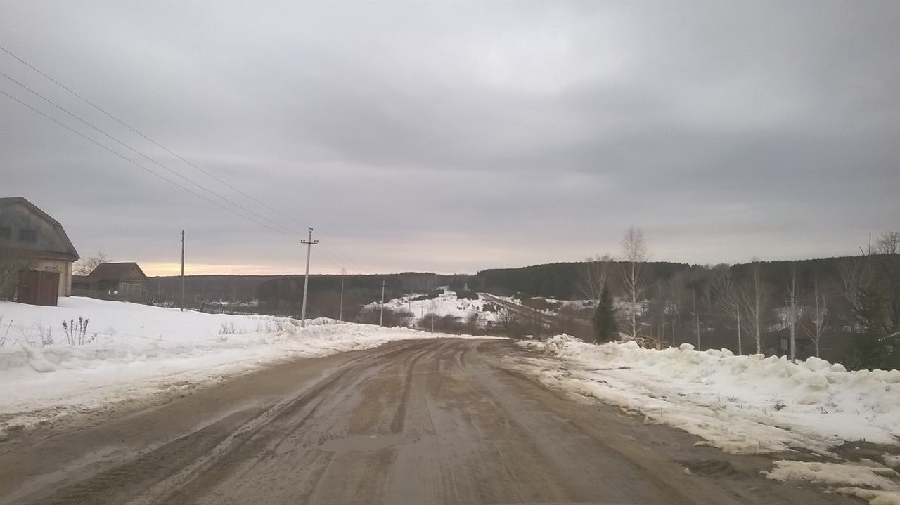 Гора